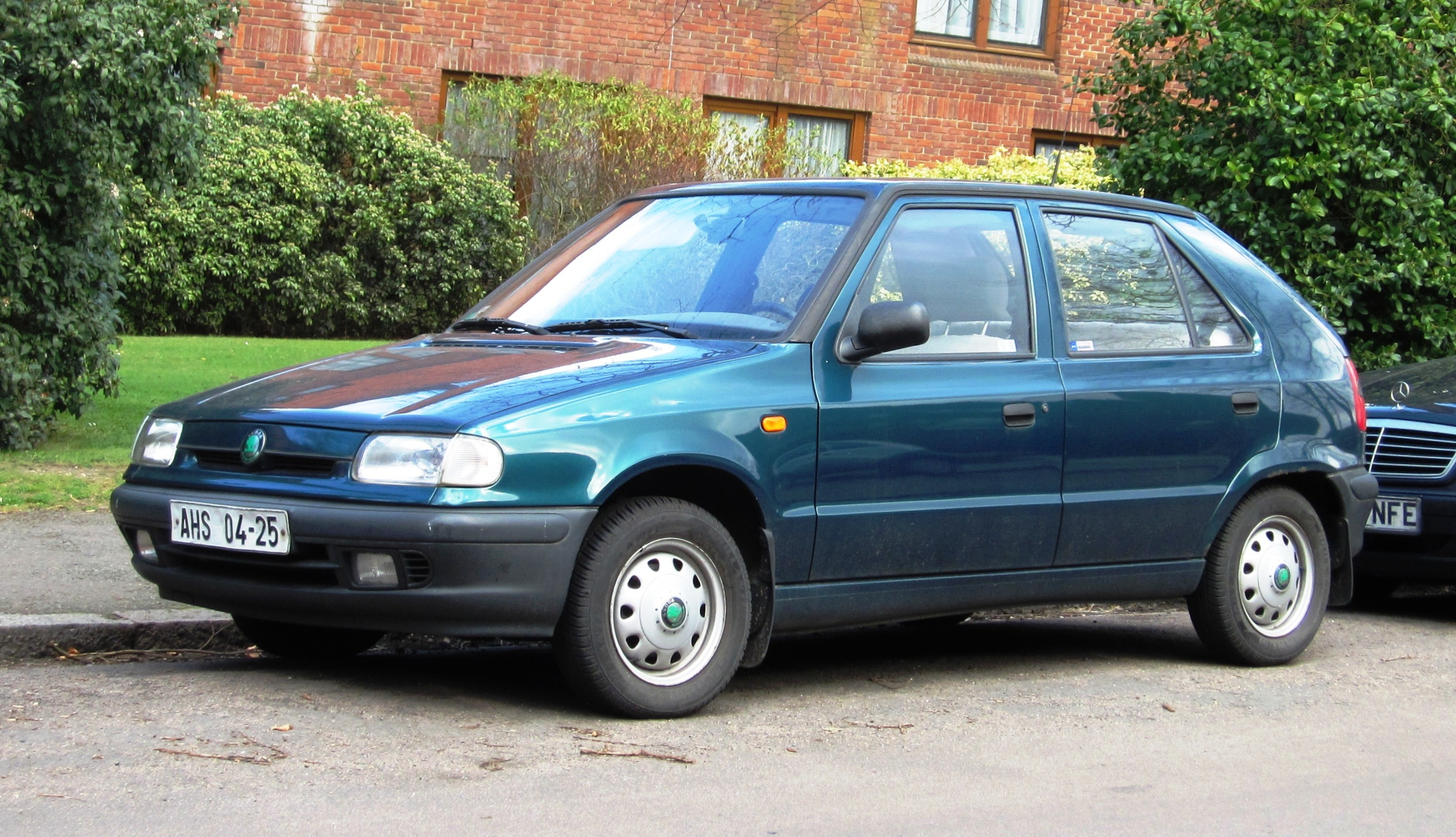 Skoda Felicia à Cambridge